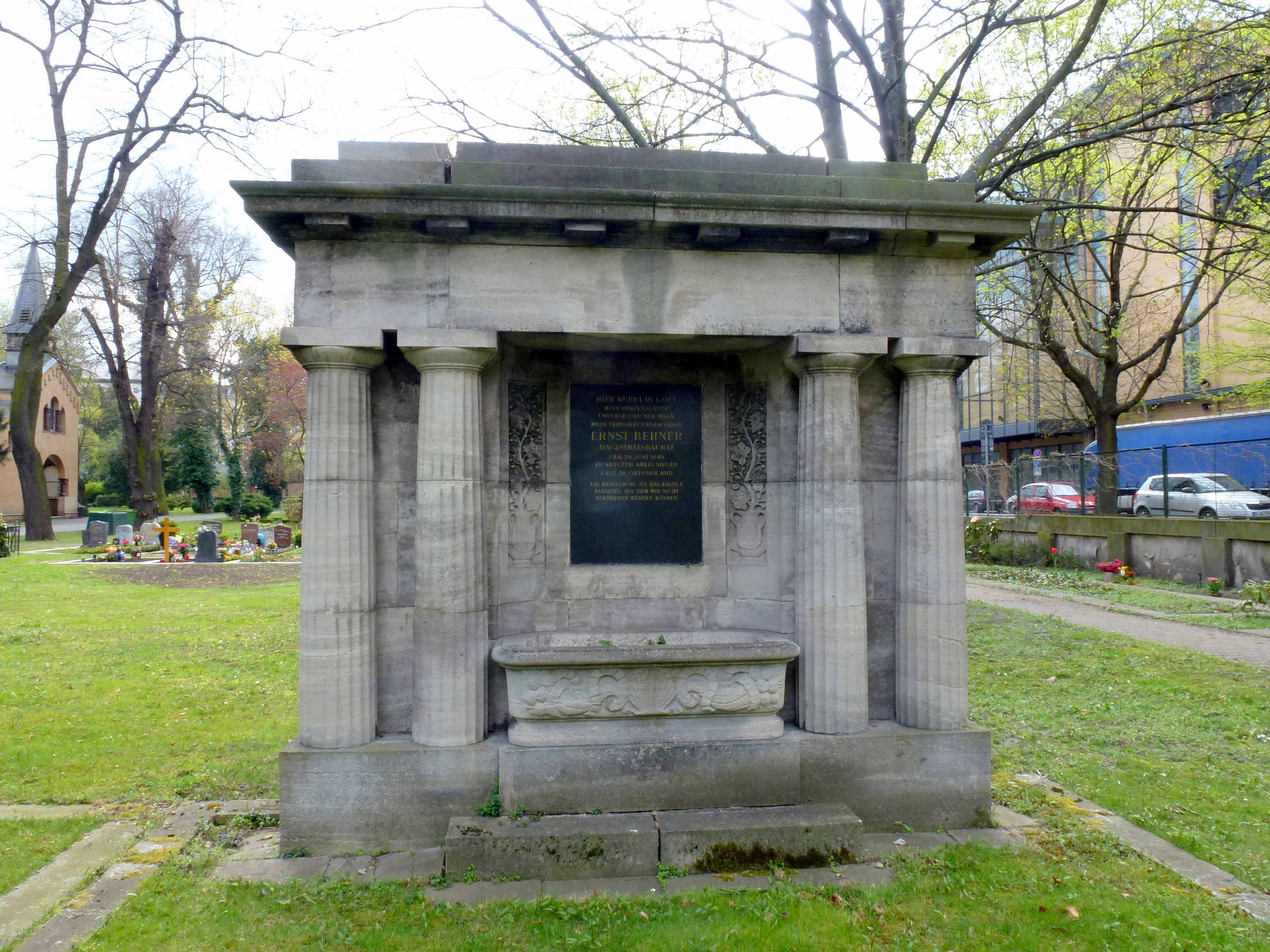 St. Philippus-Apostel-Kirchhof Grabmal Behner